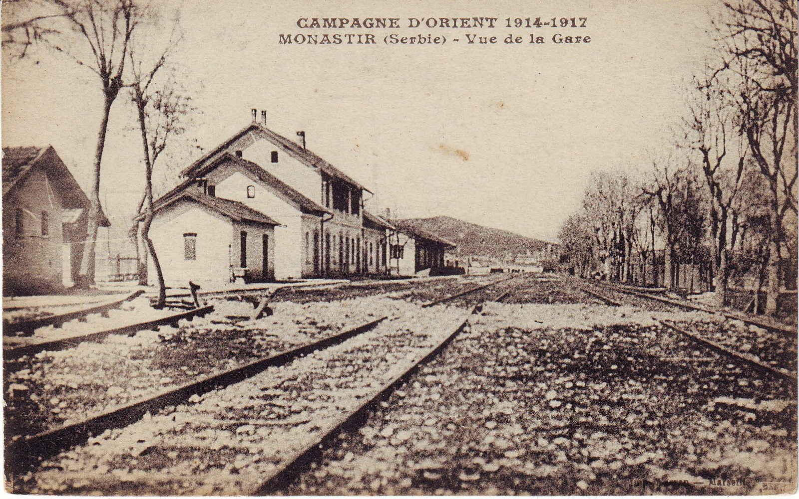 Битолската гара през Първата световна война. Съглашенска пощенска картичка